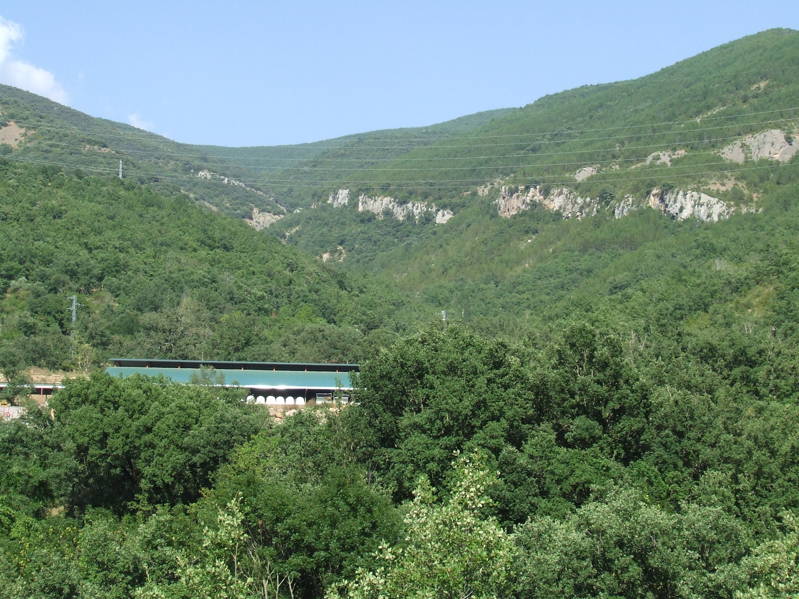 La vall del barranc de Sant Joan, a Senterada (Pallars Jussà)